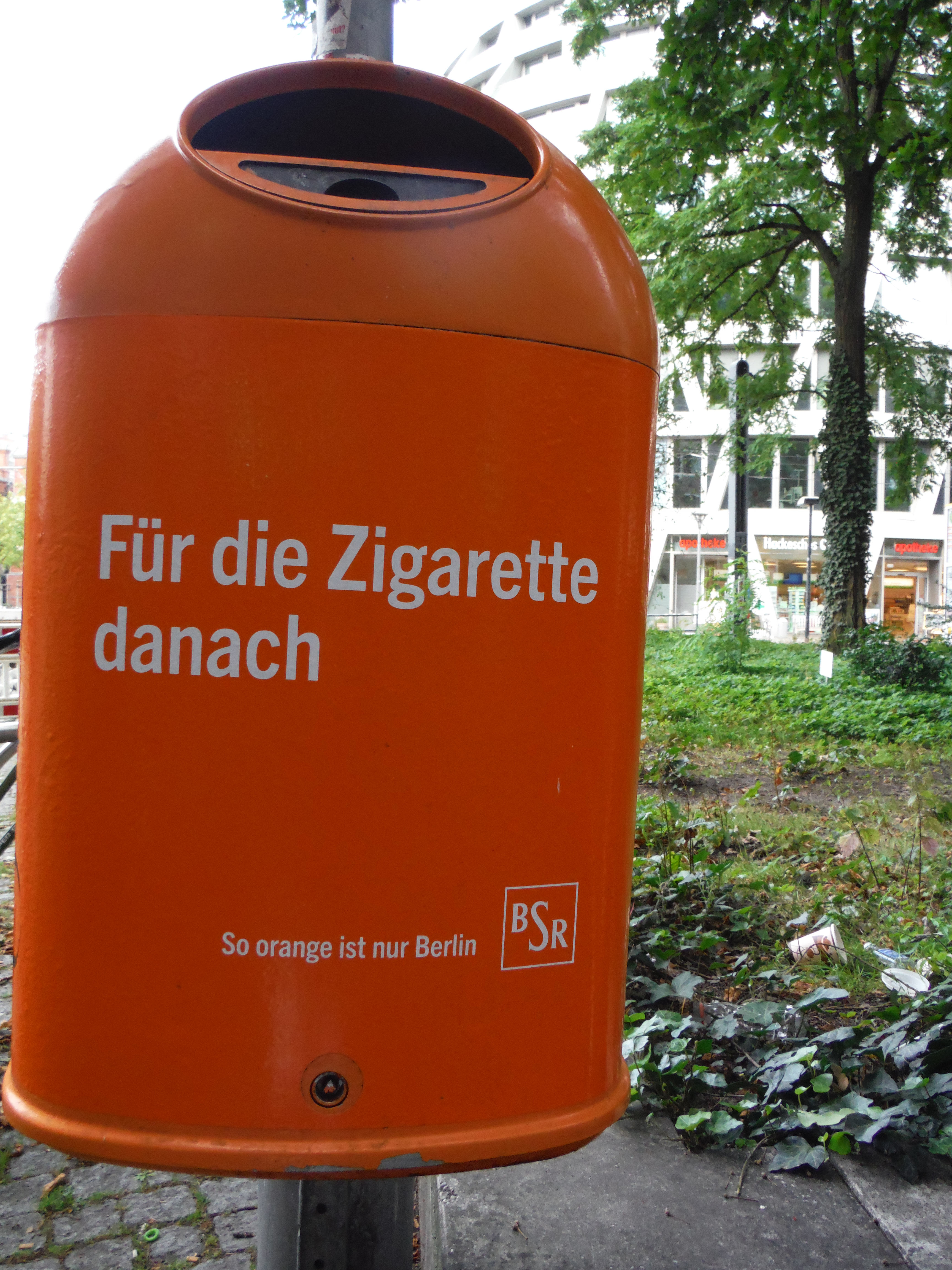 Мусорный бак в Берлине